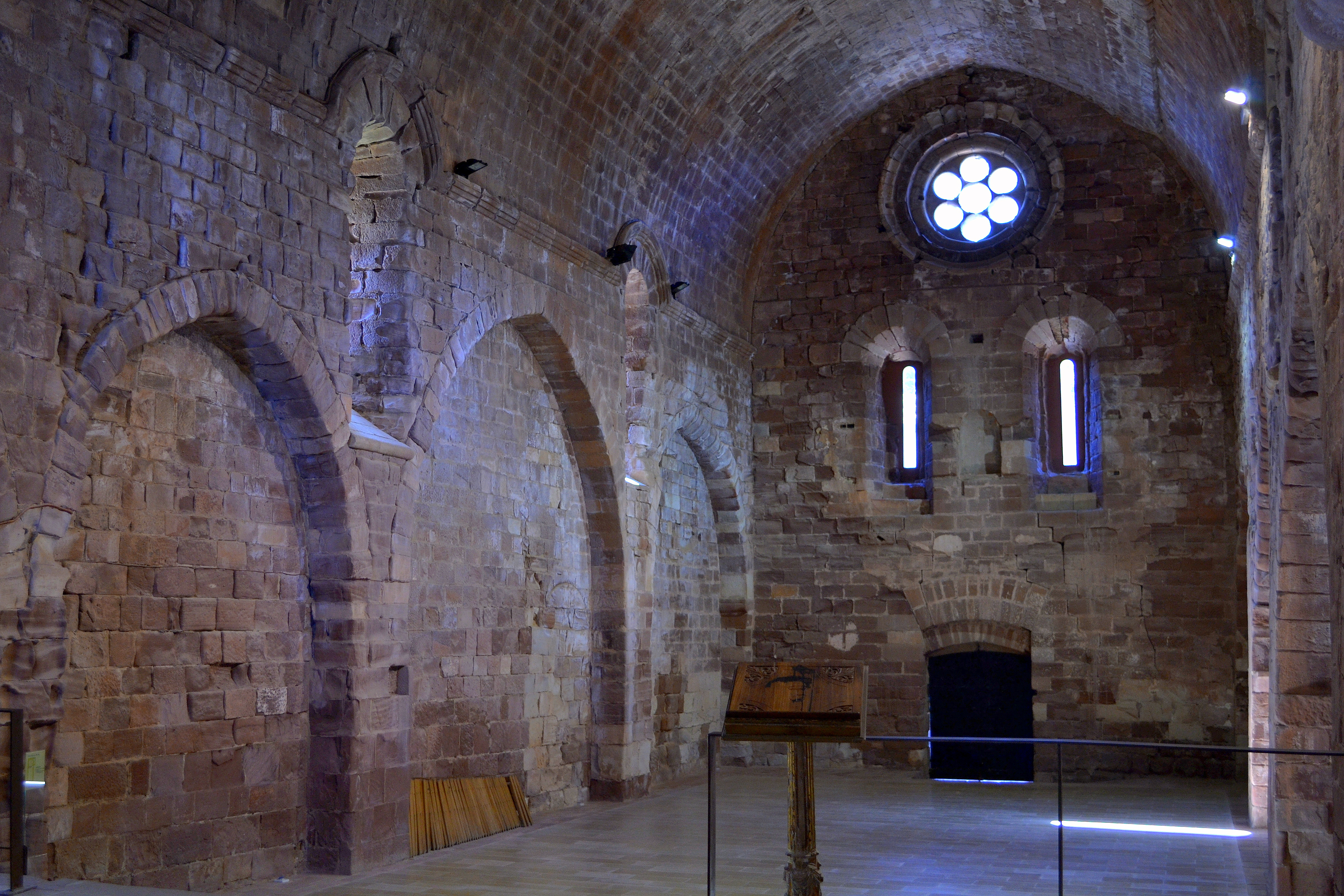 Castell monestir d'Escornalbou (Riudecanyes)